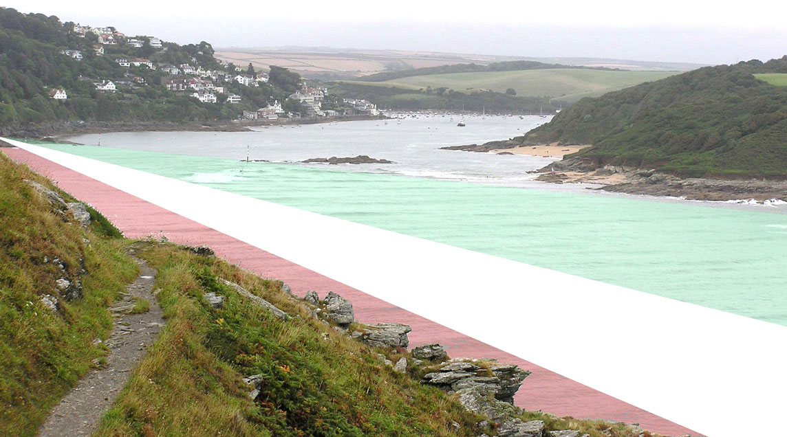 Secteurs délimités par le feu directionnel de Sandhill Point à Salcombe Attention ne pas utiliser en navigation ! tracé approximatif Lieu : Salcombe, Royaume Uni Date : 2005 Author : Pline photo personnelle